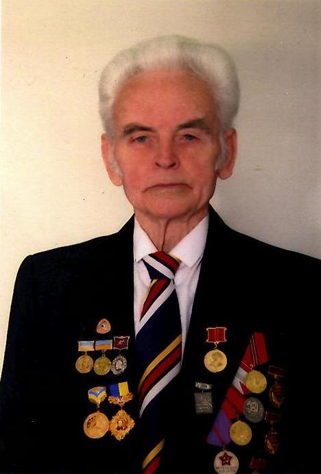 Заріцький Петро Васильович — академік АН вищої школи України